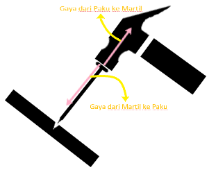 Skema Sederhana Gaya Aksi Reaksi